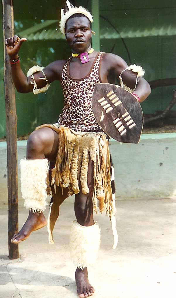 Zuludänzer